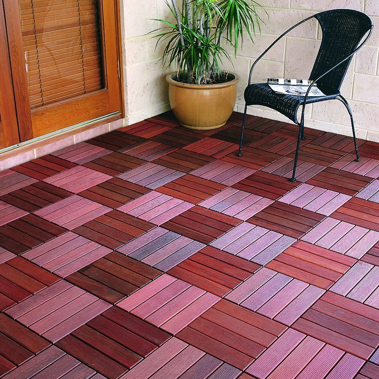 уложенный декинг